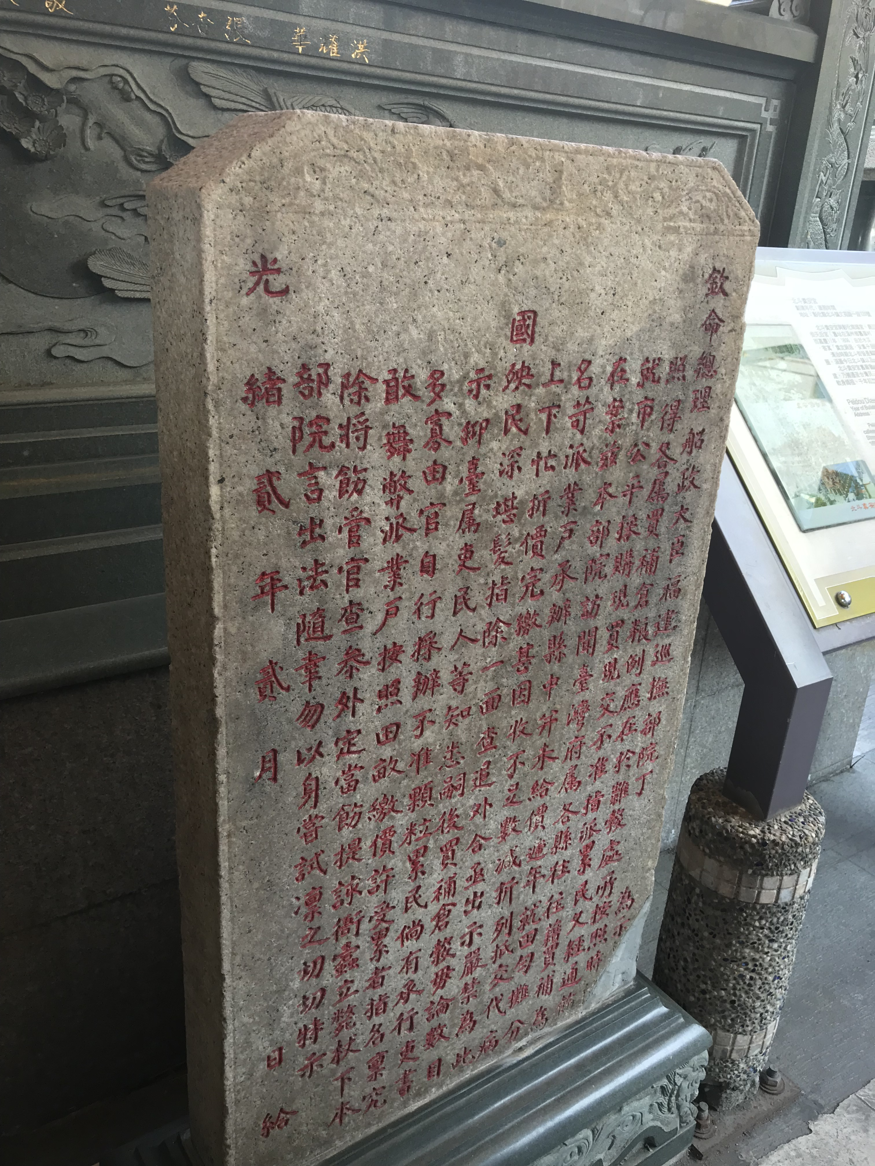 北斗奠安宮買補倉糧示禁碑